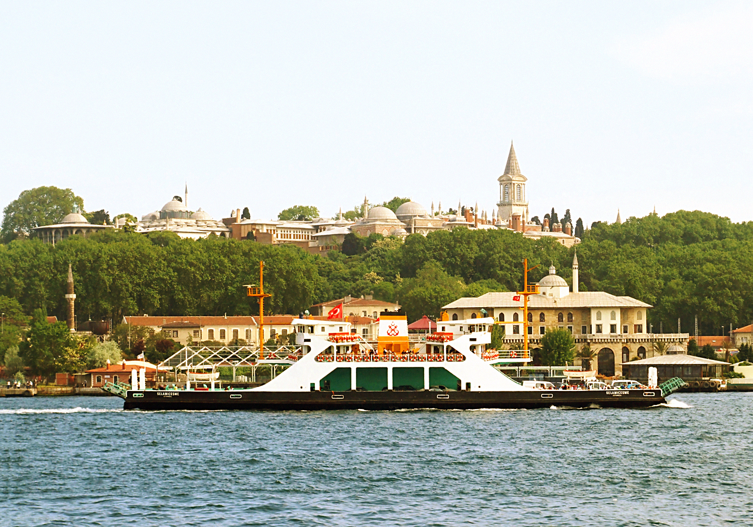 Stambuł, pałac Topkapi, widok z Bosforu; Istambul, Topkapi palace, a view from Bosphorus